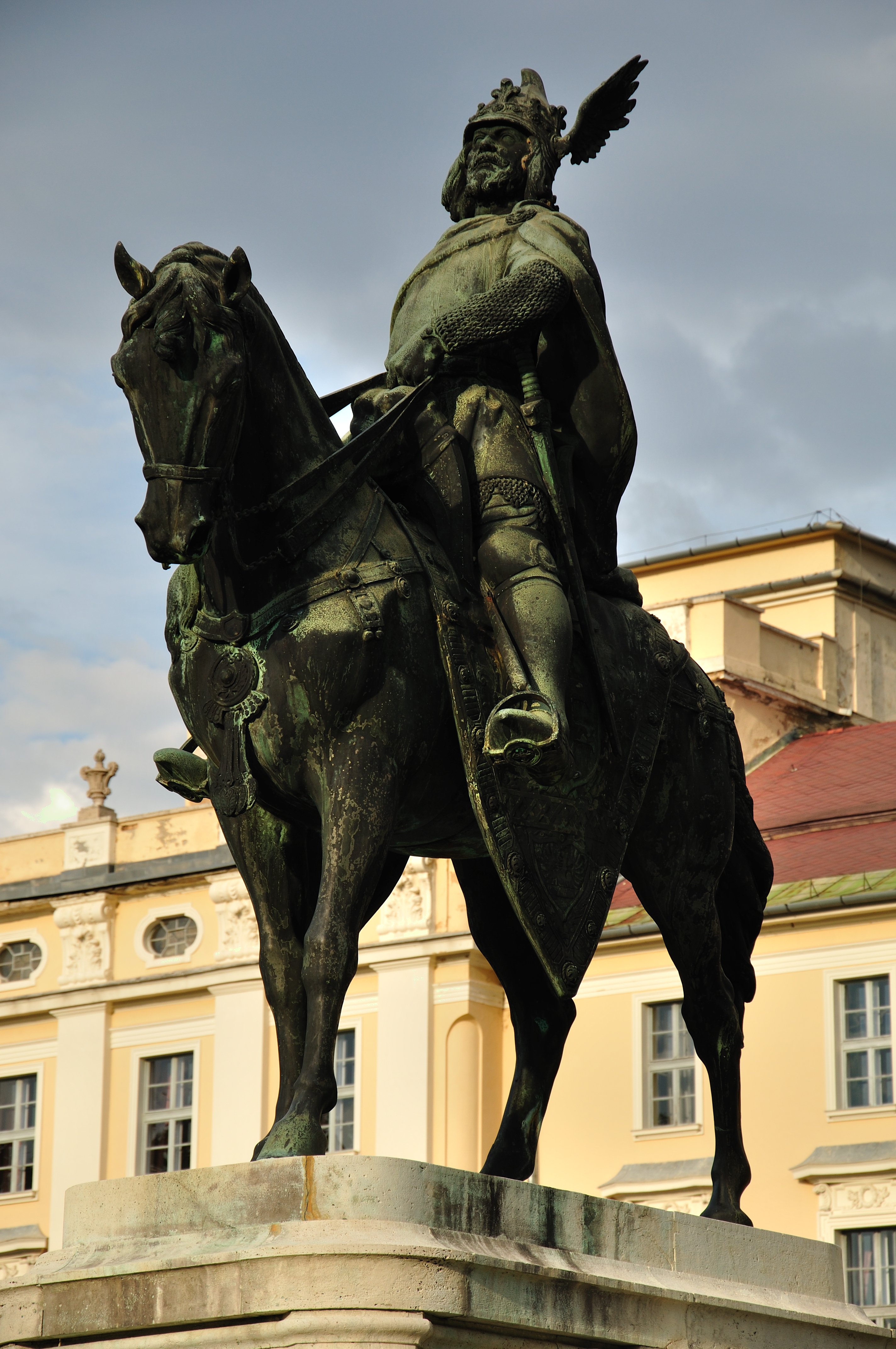 Kálmán herceg lovas szobra This is a photo of a monument in Hungary. Identifier: 15408